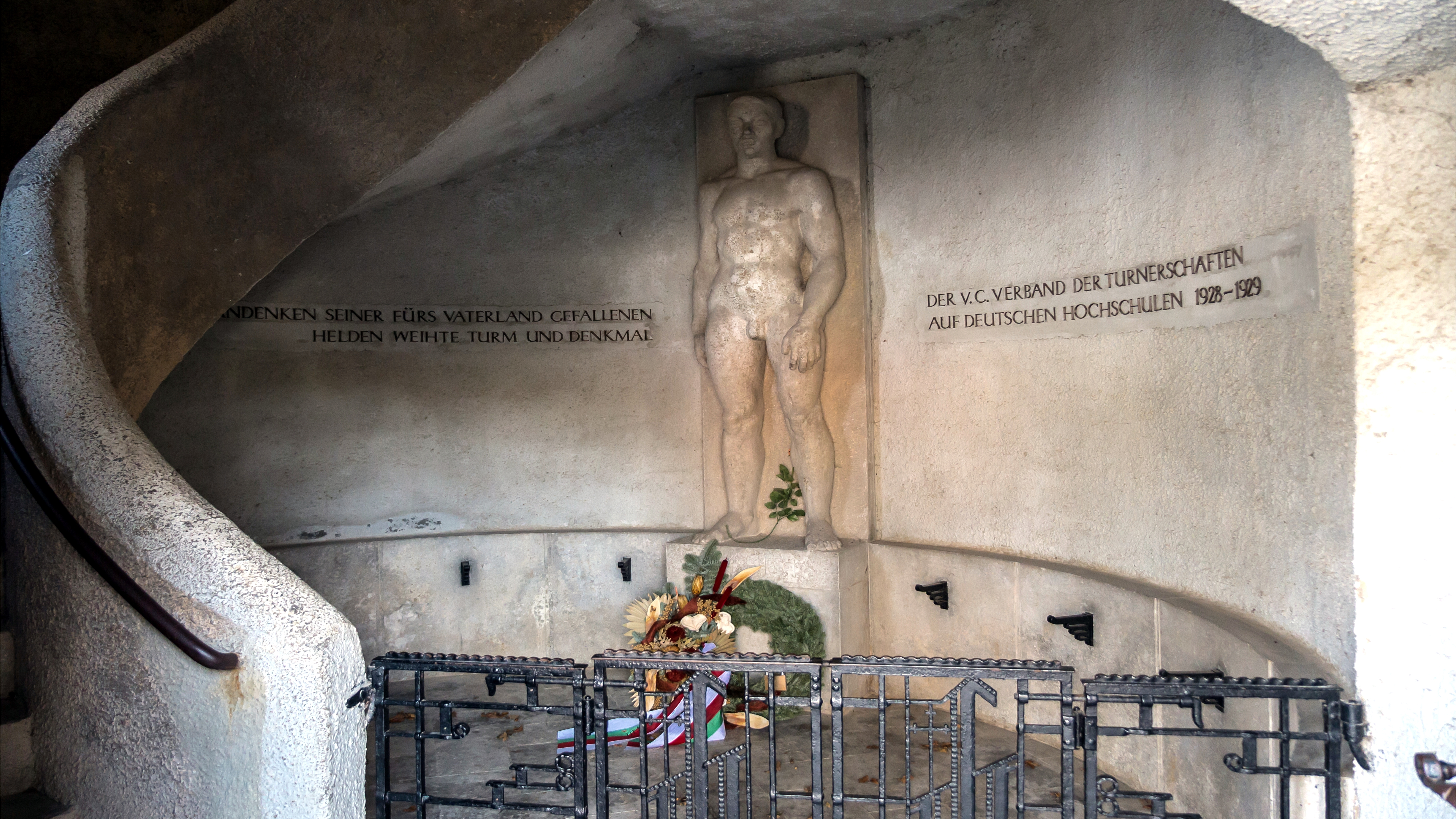 (NSG Nr.158) Naturschutzgebiete in Thüringen Burg Greifenstein Bad Blankenburg, Denkmal im Turmeingang